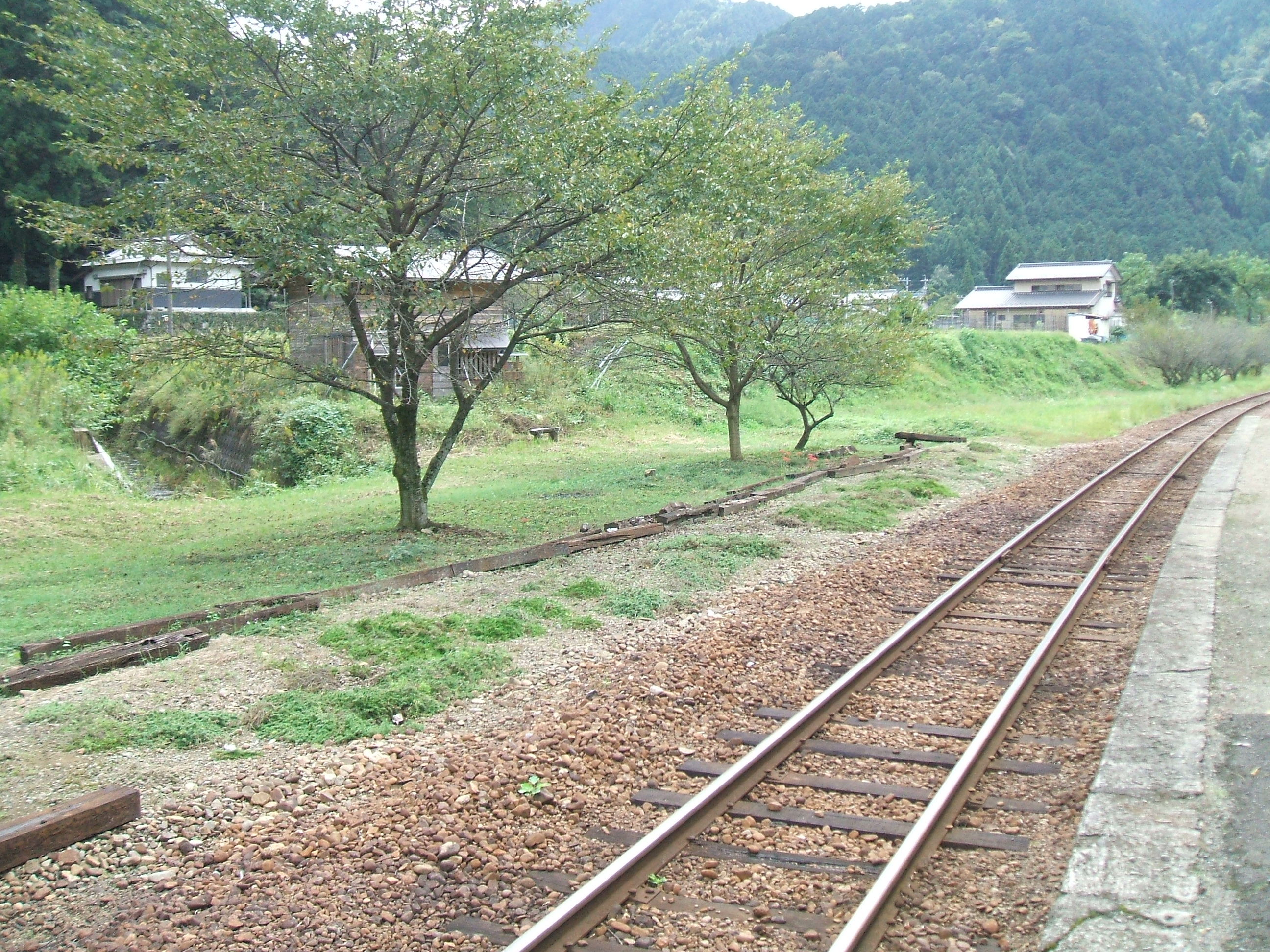 ホームの様子。